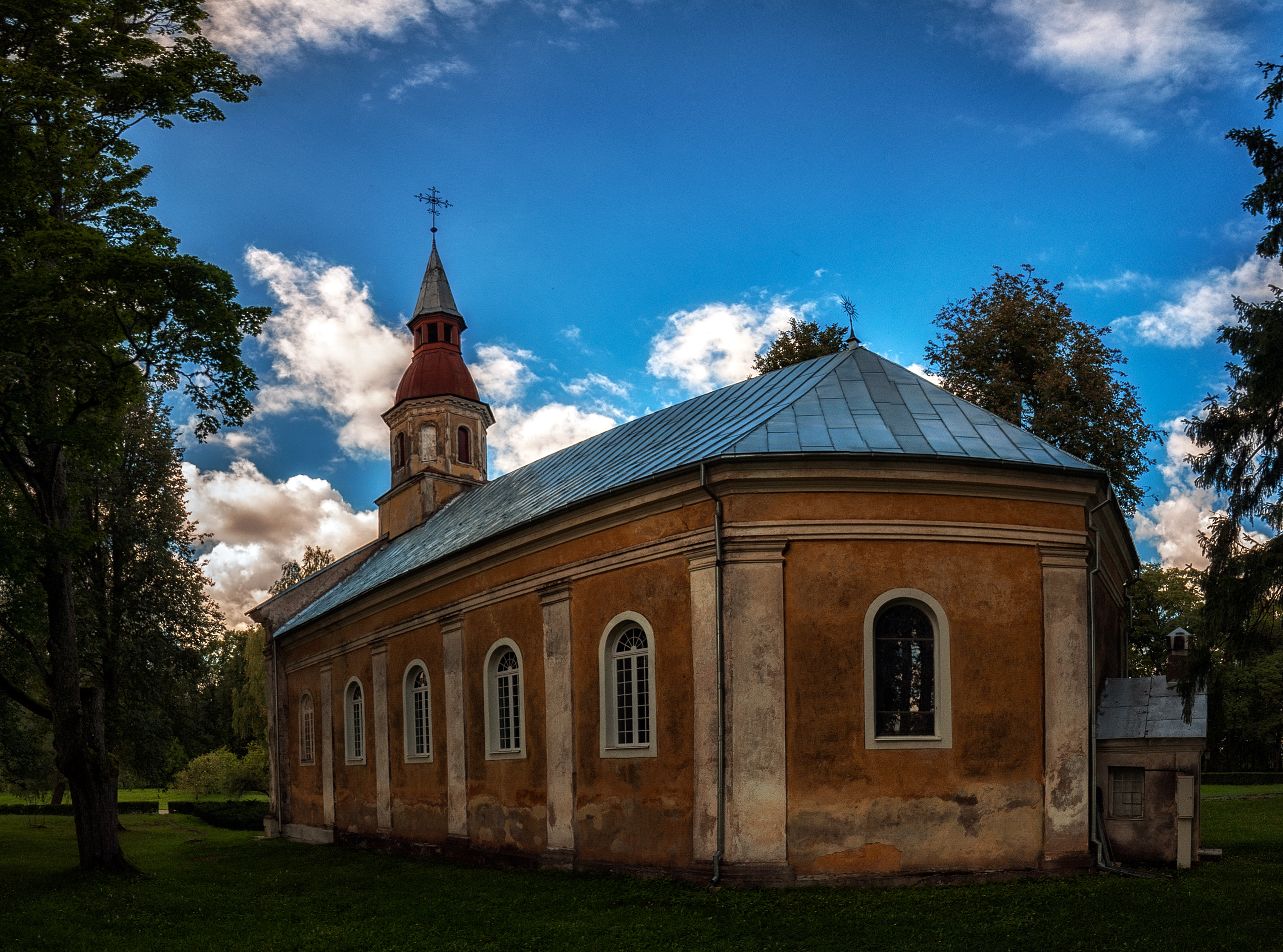 Asares luterāņu baznīca, Asare